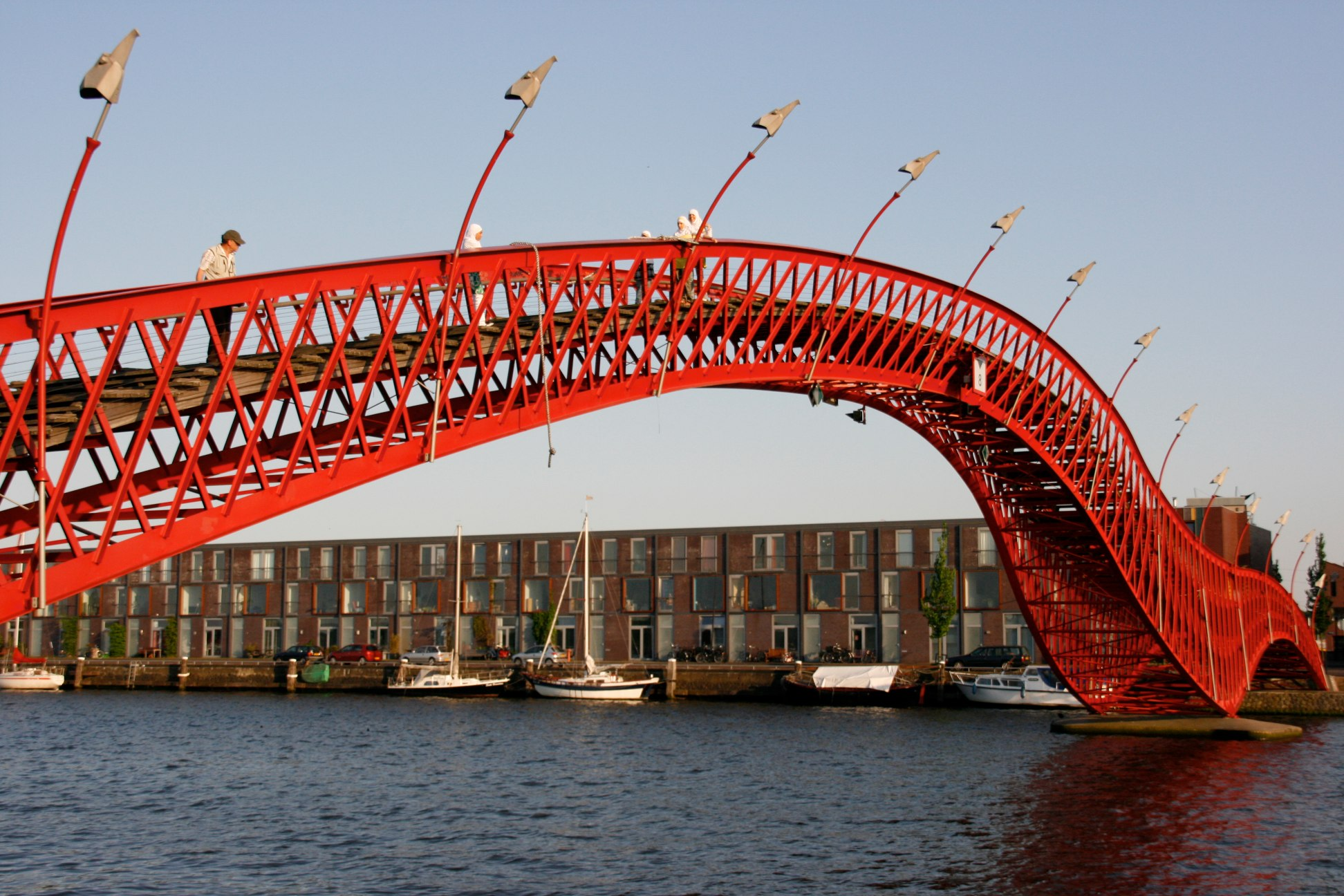 Java Eiland